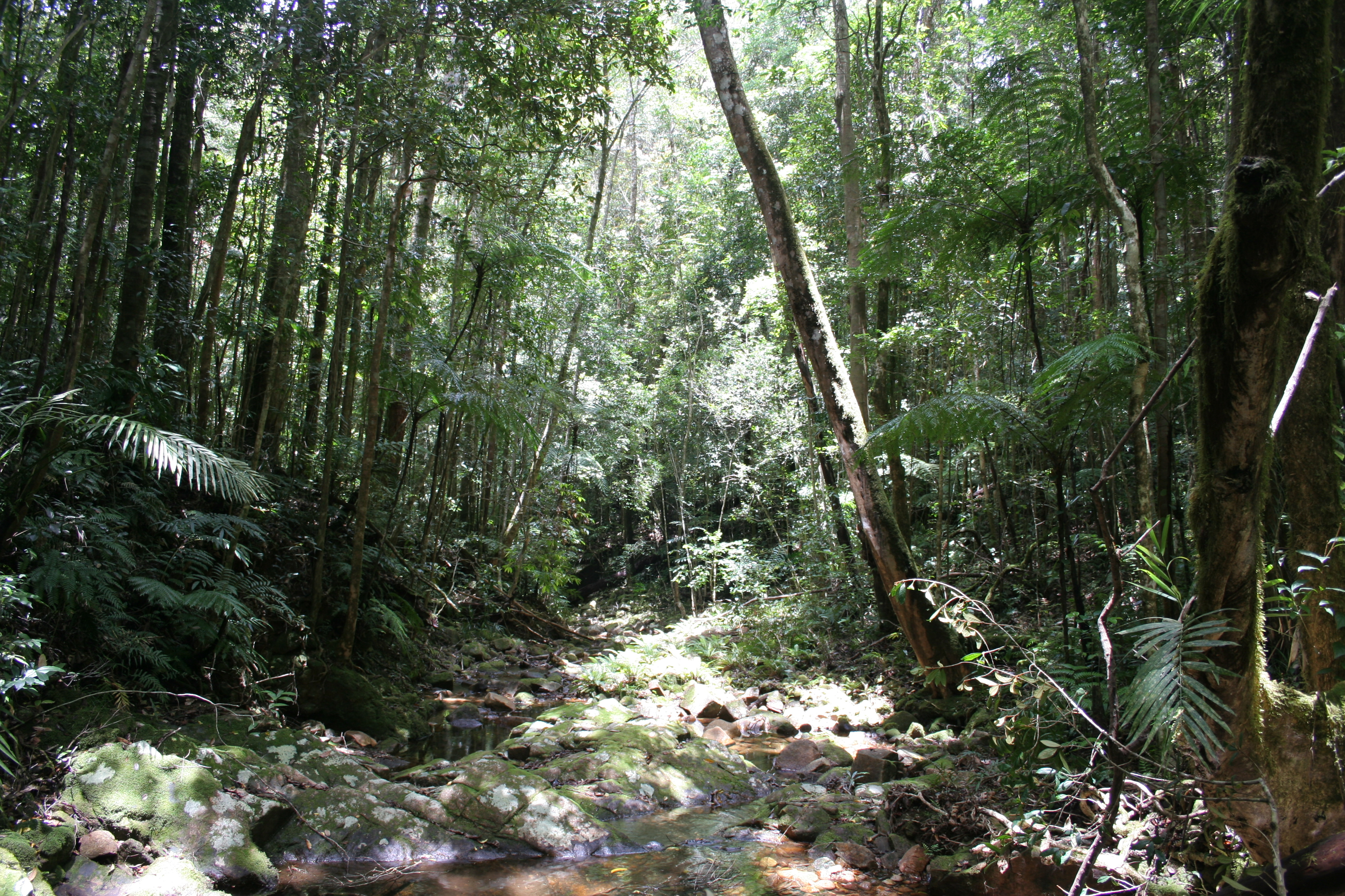 Paluma Range tropical rainforest, Australia